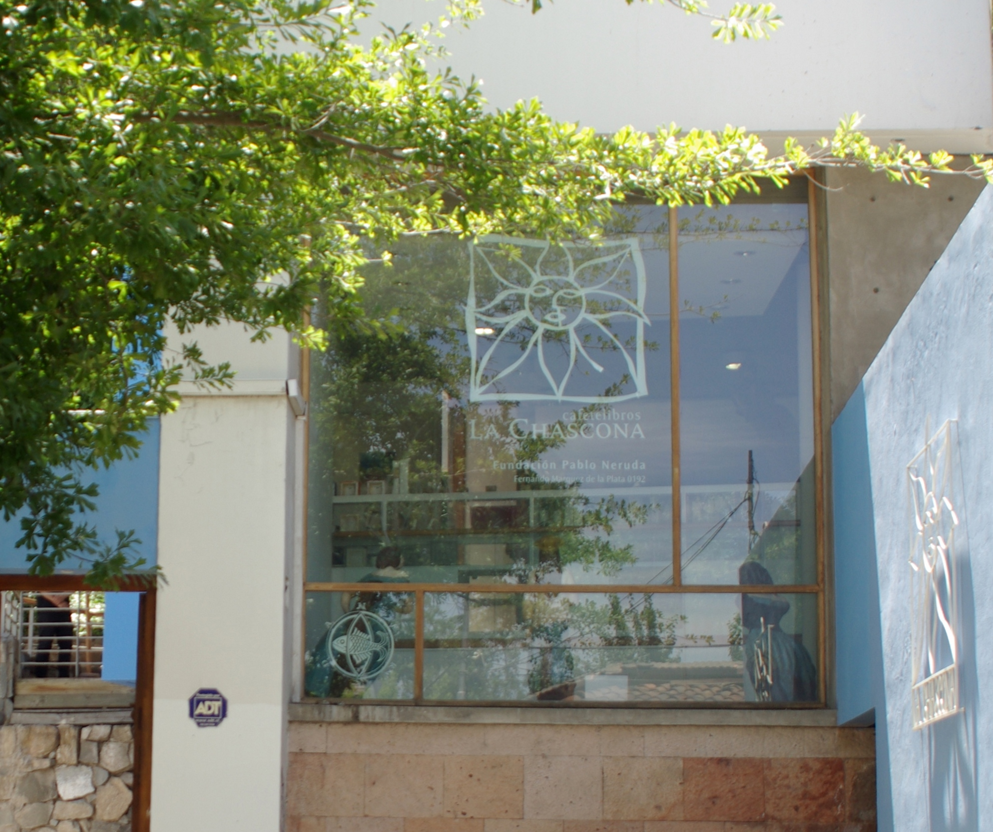 La Fundacion Pablo Neruda tiene su sede en La Chascona, la casa del poeta chileno y Premio Nobel de Literatura ubicada en la calle Fernando Márquez de La Plata 0192, barrio Bellavista, Santiago de Chile.